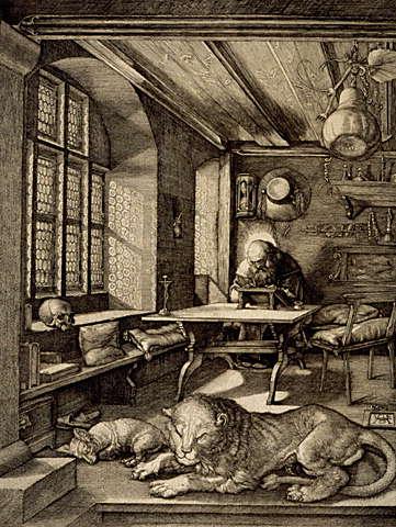 Eusebius Hieronymus Sophronius